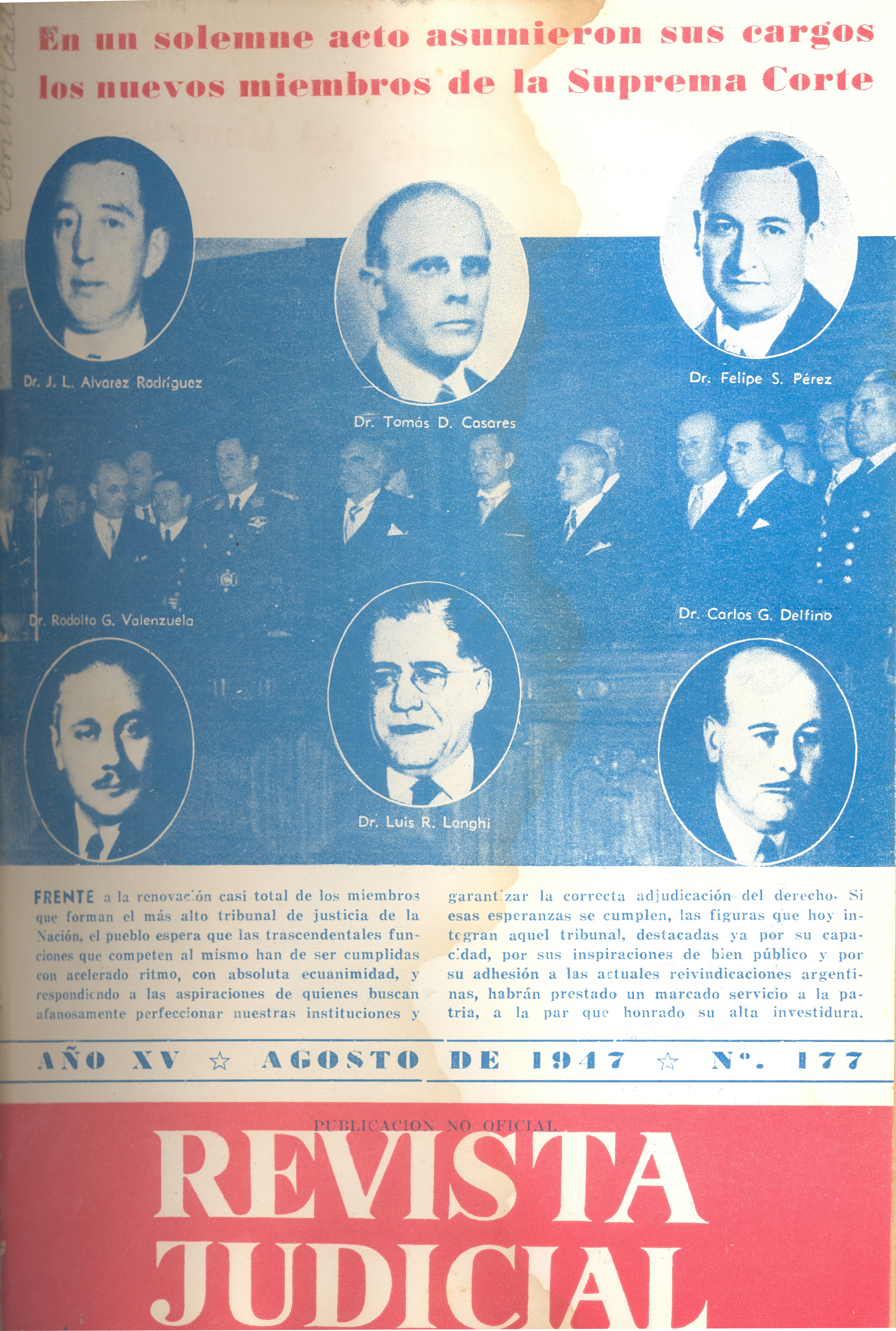 Revista Judicial nº177: "En un solemne acto asumieron sus cargos los nuevos miembros de la Suprema Corte".